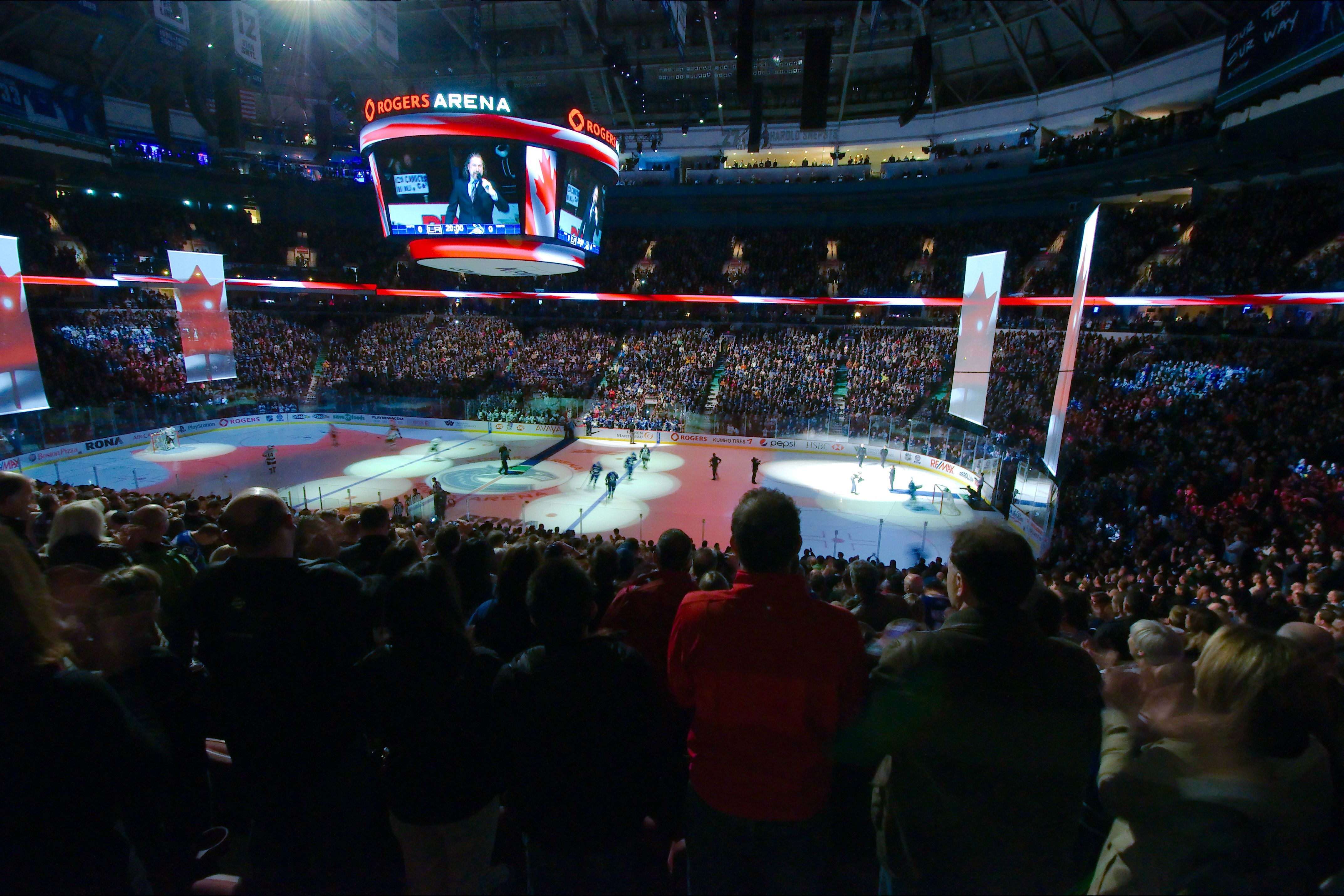 Hymne Canadien